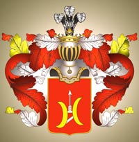 Hurko Armorial